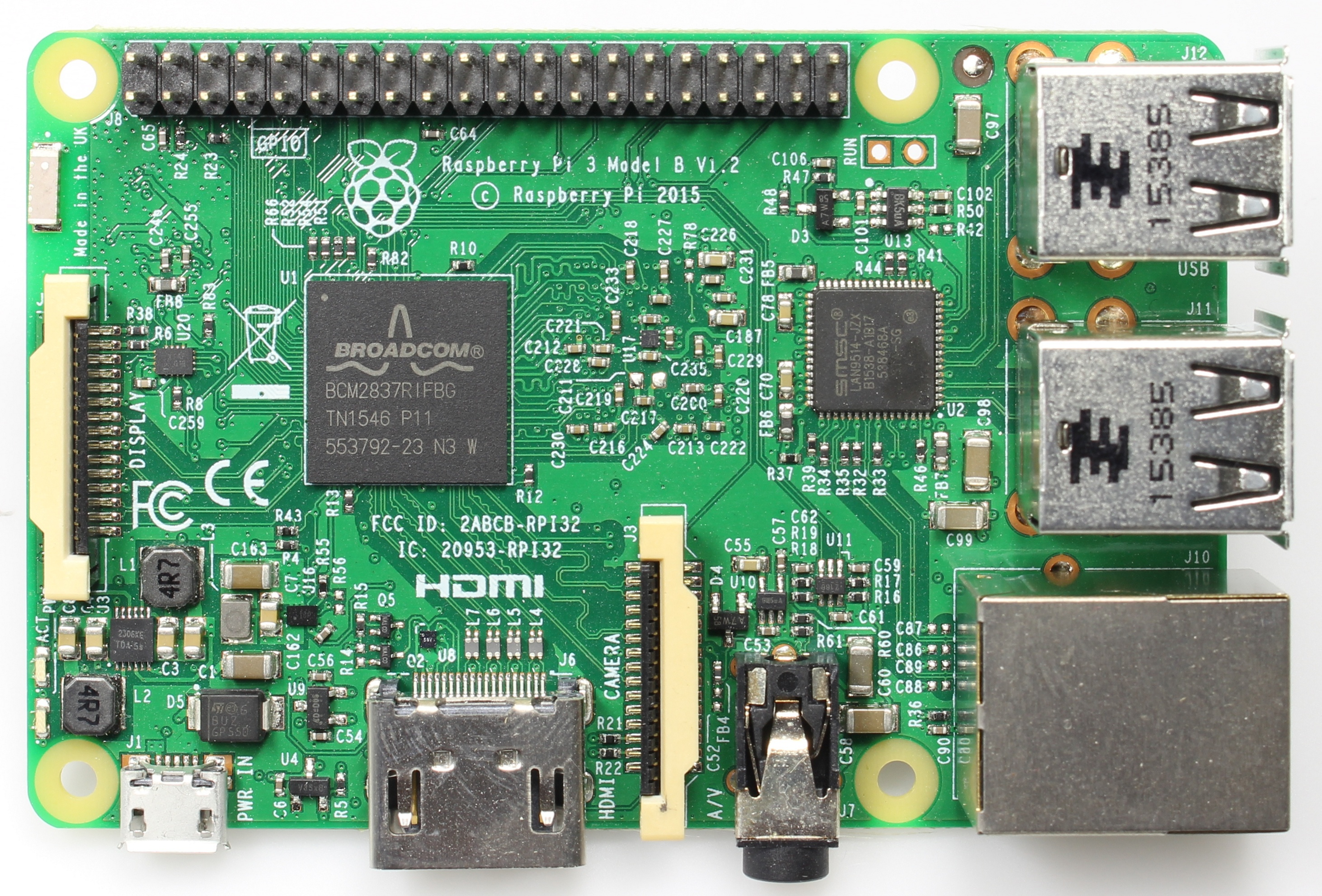 Raspberry Pi 3 Model B V1.2, Oberseite